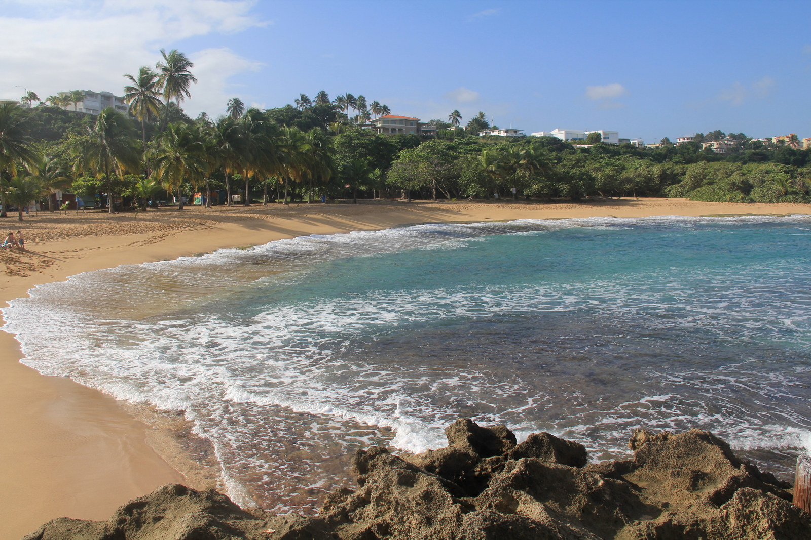 Tierras Nuevas Saliente, Manatí, Puerto Rico